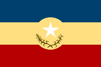 Bandera del municipio Cristóbal Rojas, estado Miranda, Venezuela